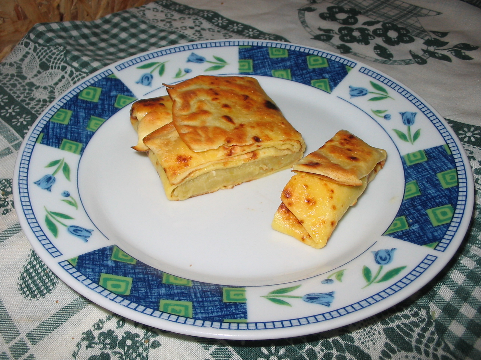 налисник з начинкою зі смаженої цибулі та відвареного гороху